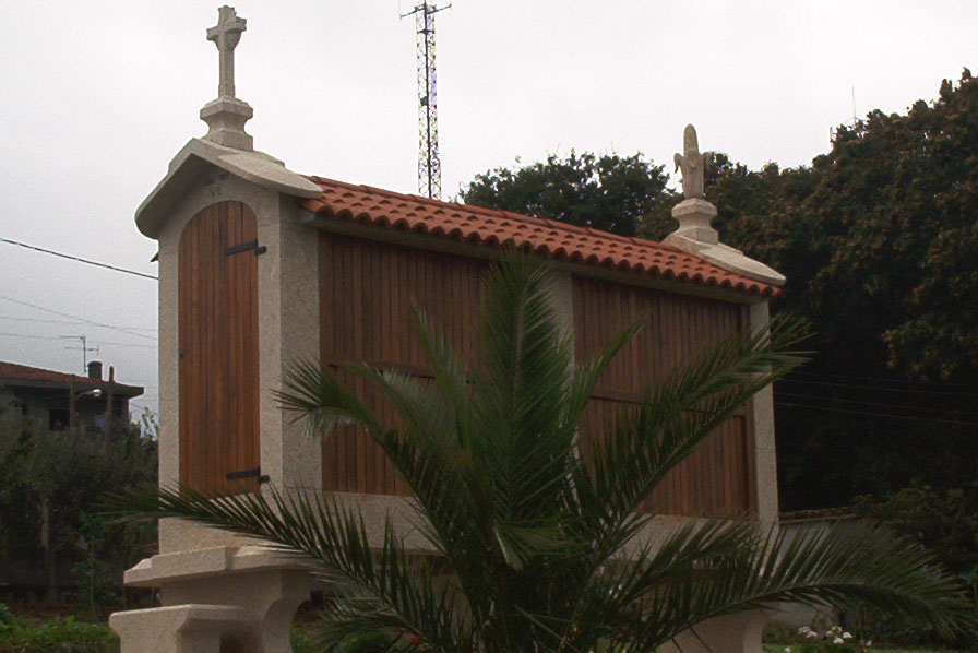 Hórreo construído moi recentemente, con tecnoloxías de marmoleiría, pero respectando en boa medida as características das vellas construcións, con armazón pétrea e laterais de madeira. Porta penal, cuberto con "tella inglesa" e adornado con cruz e lampión que debuxa unha espiga de millo a medio esfollar. Ubicado en Sendelle (Antas de Ulla)